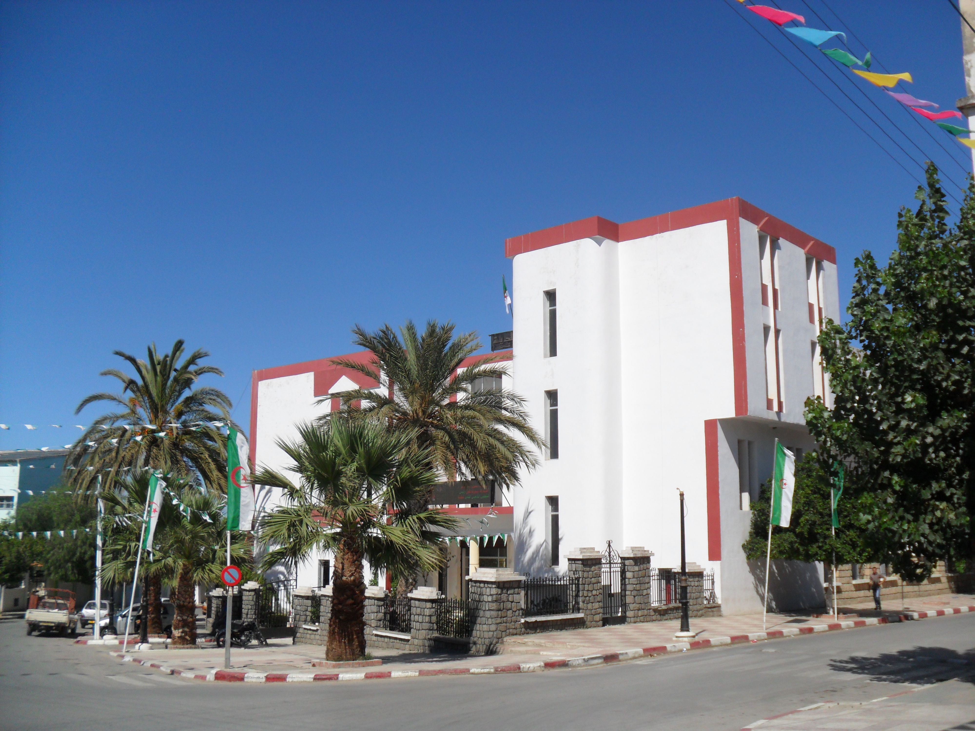 Siège de la Mairie de Kaous à la wilaya de Jijel (Algérie)